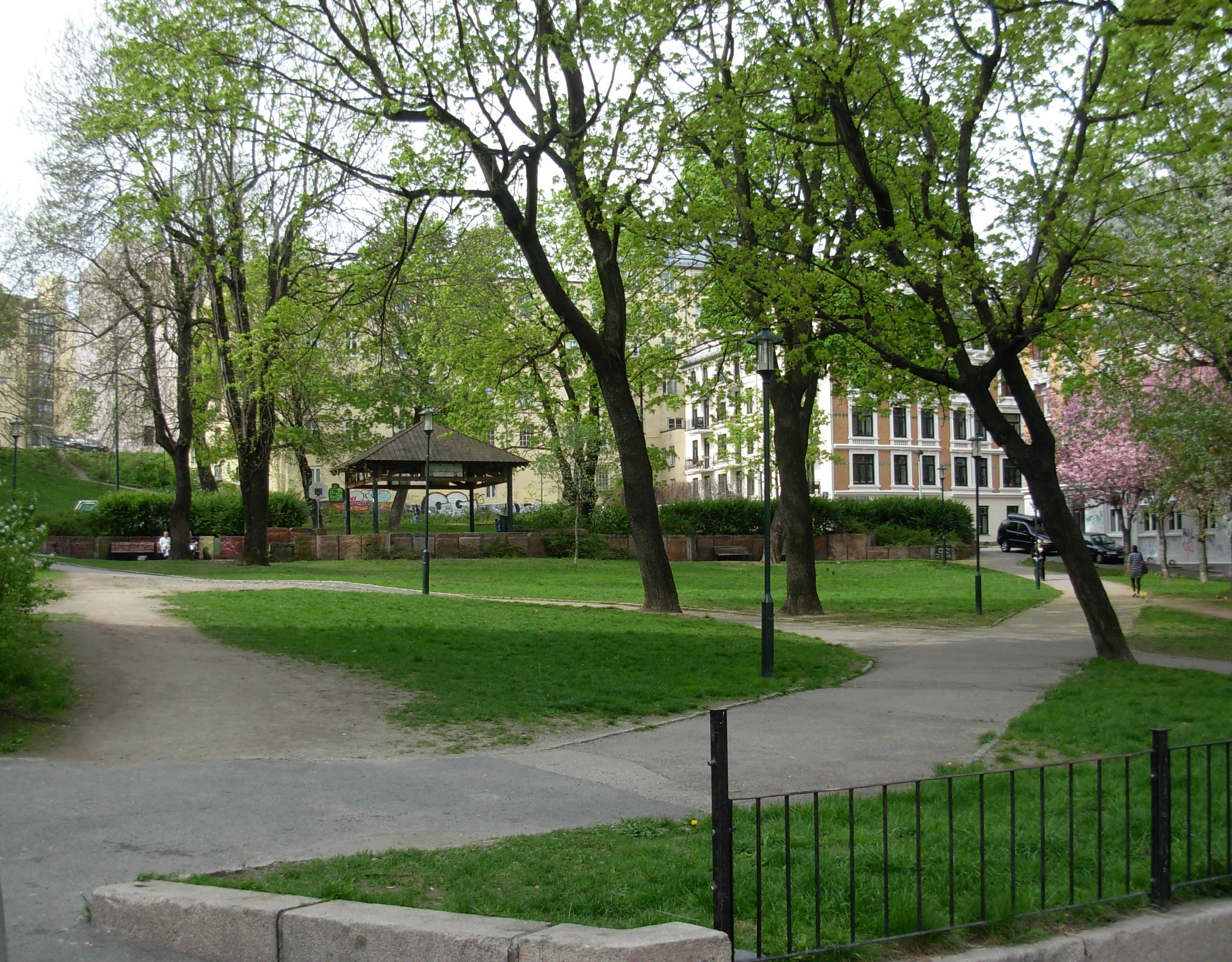 Kristparken, Hammersborg, Oslo, i mai, sett fra Møllergata